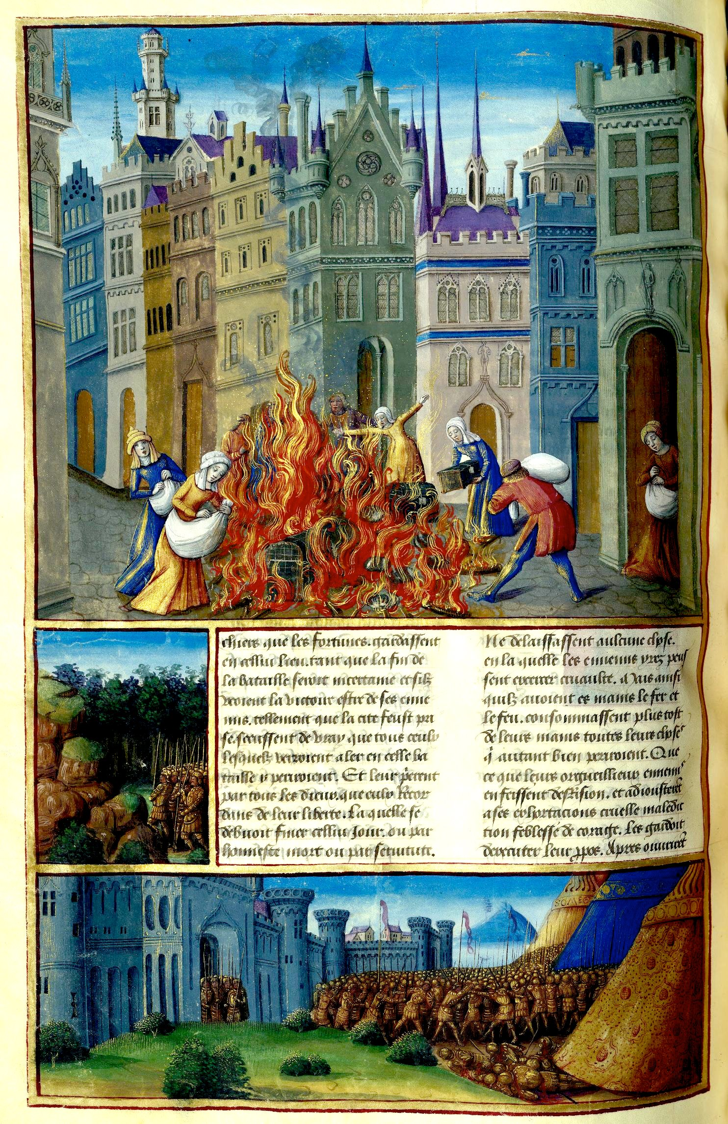 Romuleon-BnF364-f199v Bataille d'Astapa